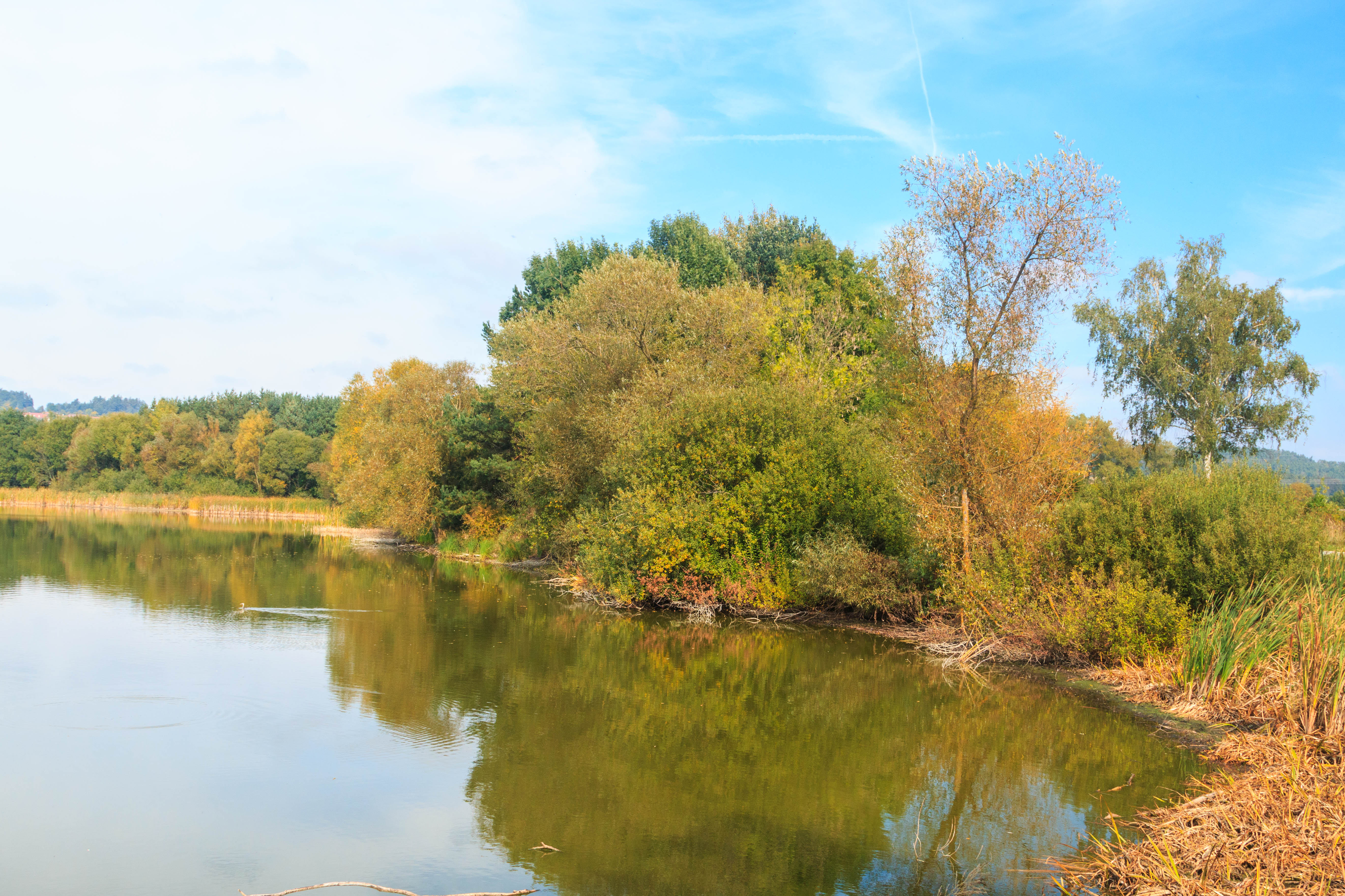 Rybník Chválovec u Chrášťovic Project: Vodstvo.